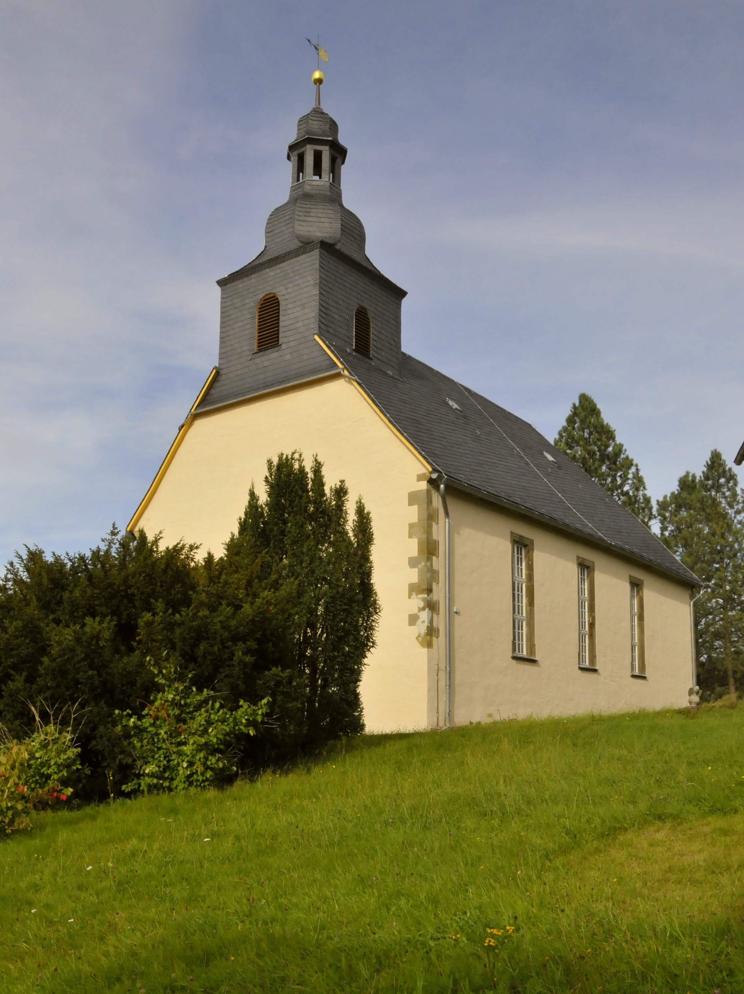 Tambach-Dietharz, Bergkirche